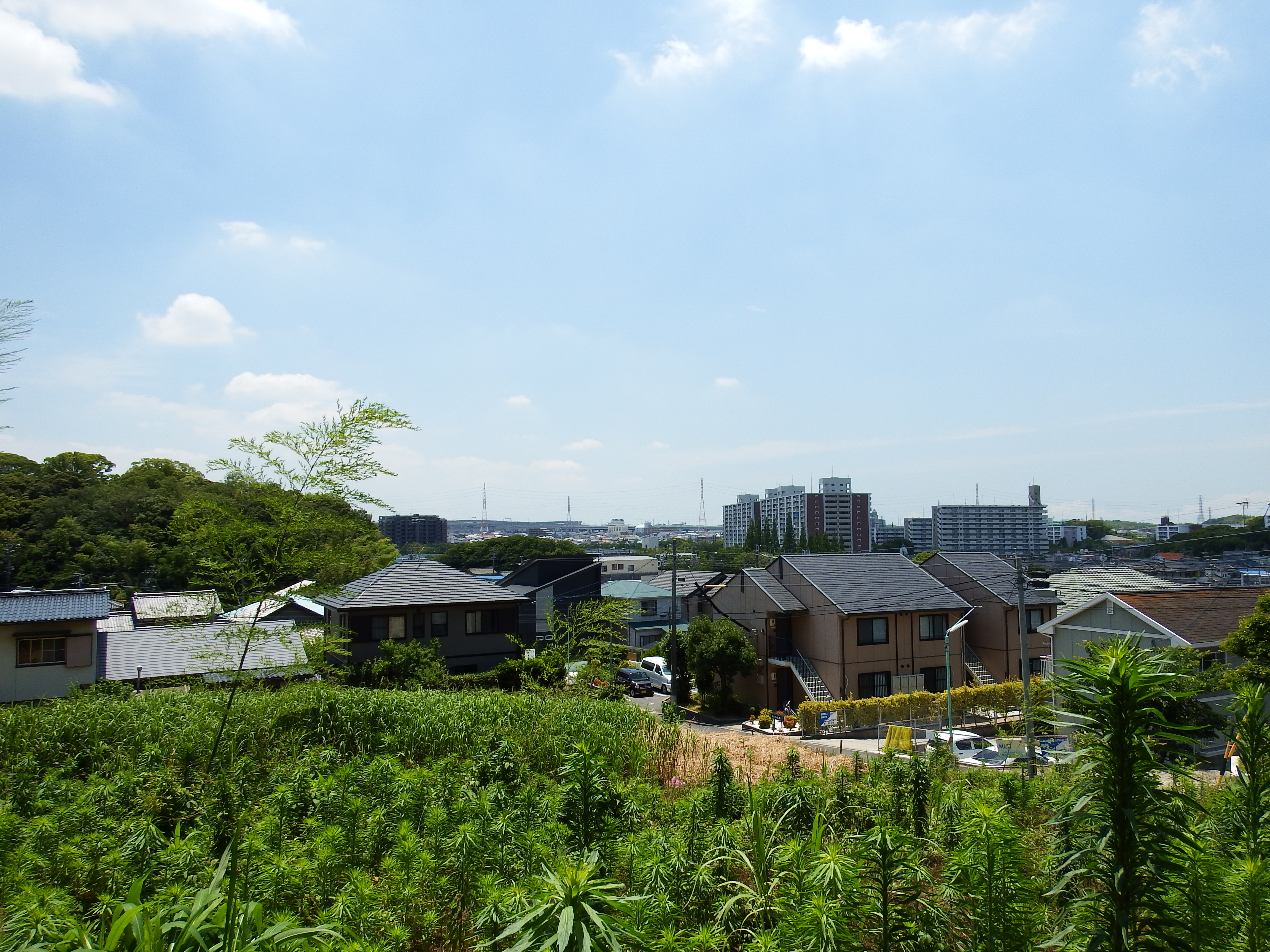 名古屋市緑区大高町付近